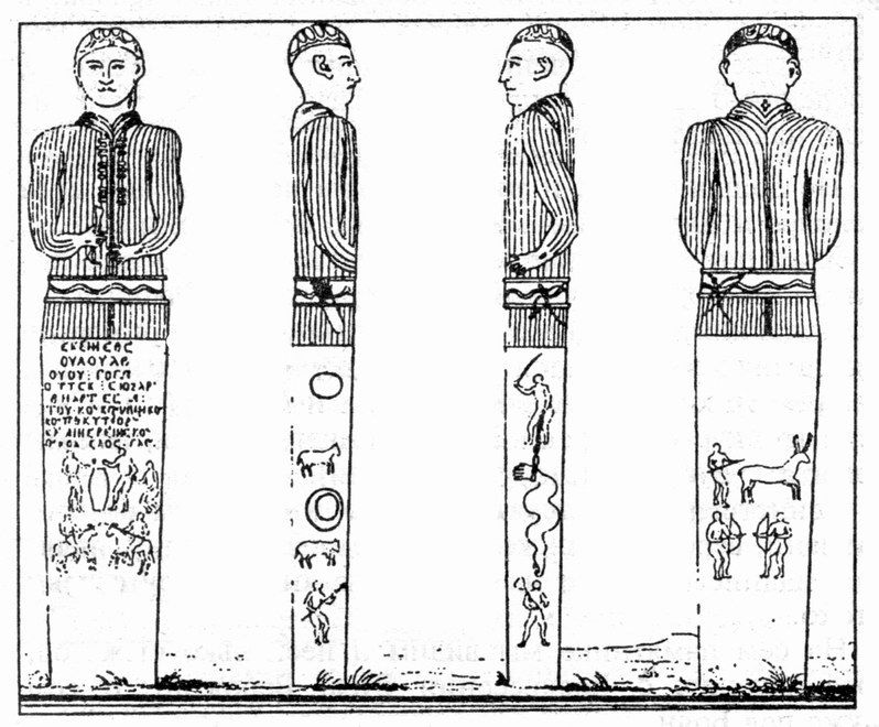 Этокский памятник (Монумент Буса, Статуя Дука-бек). IV век.